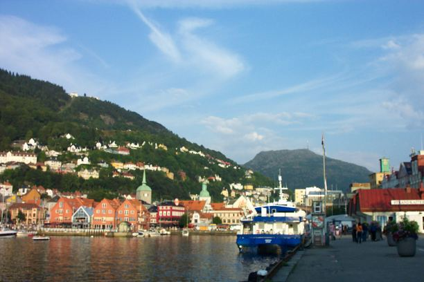 Bergen, Norway